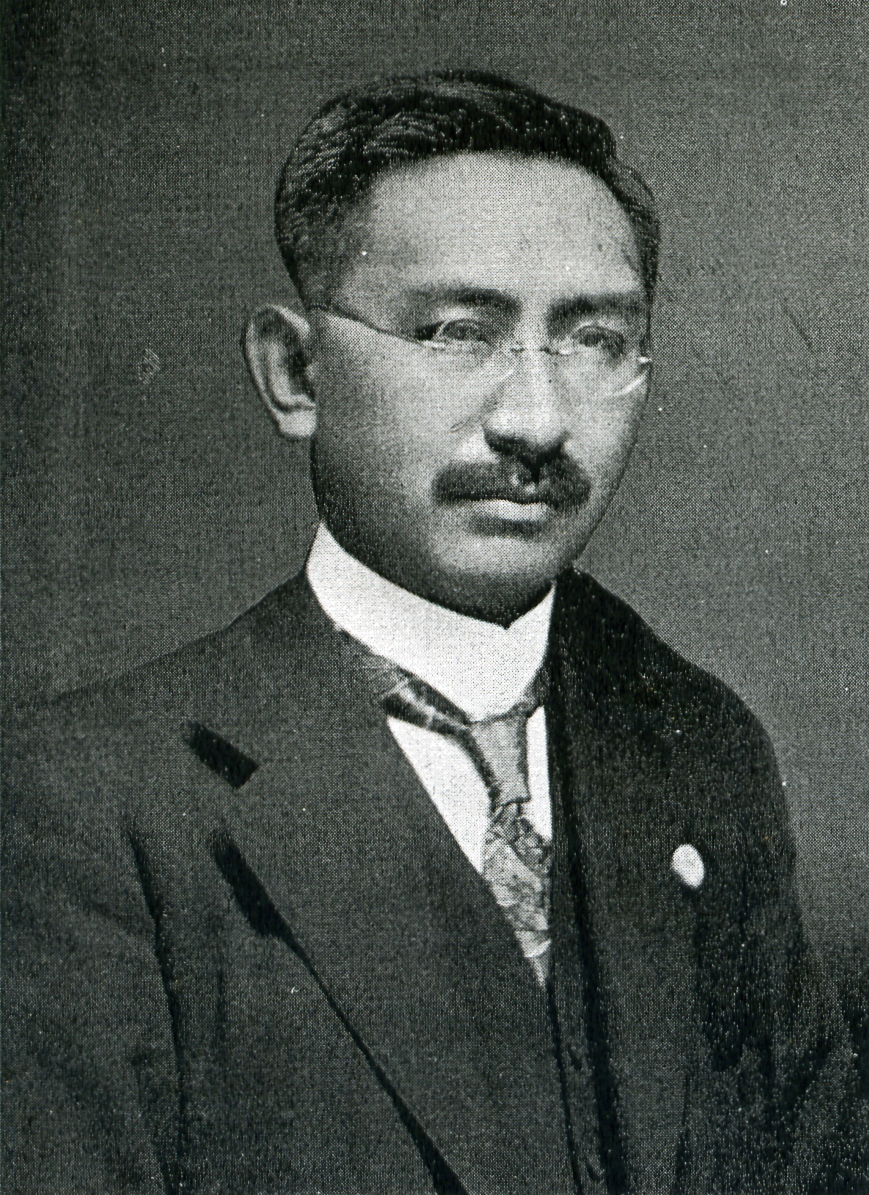 この写真は、熊谷巌（1883-1933）の写真です。